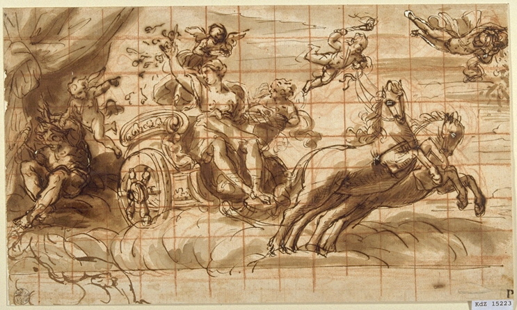 Aurora, Feder und Pinsel, 18,6x31,7 cm Berlin, Staatliche Museen